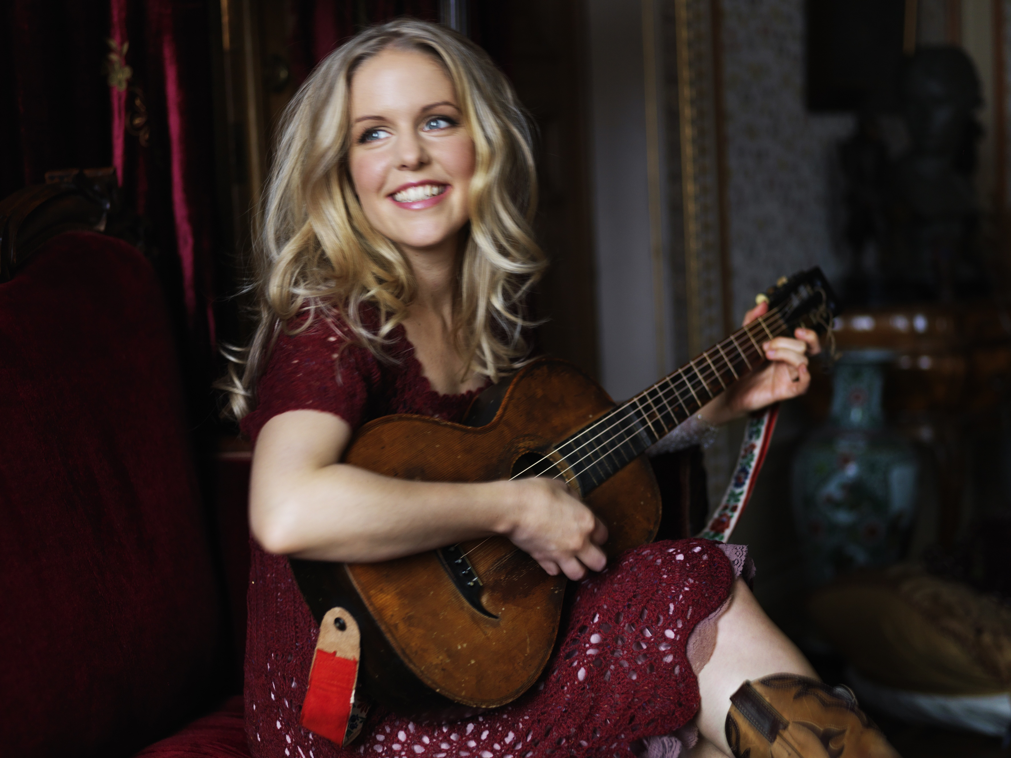 Sångerskan och musikern Sofia Karlsson.